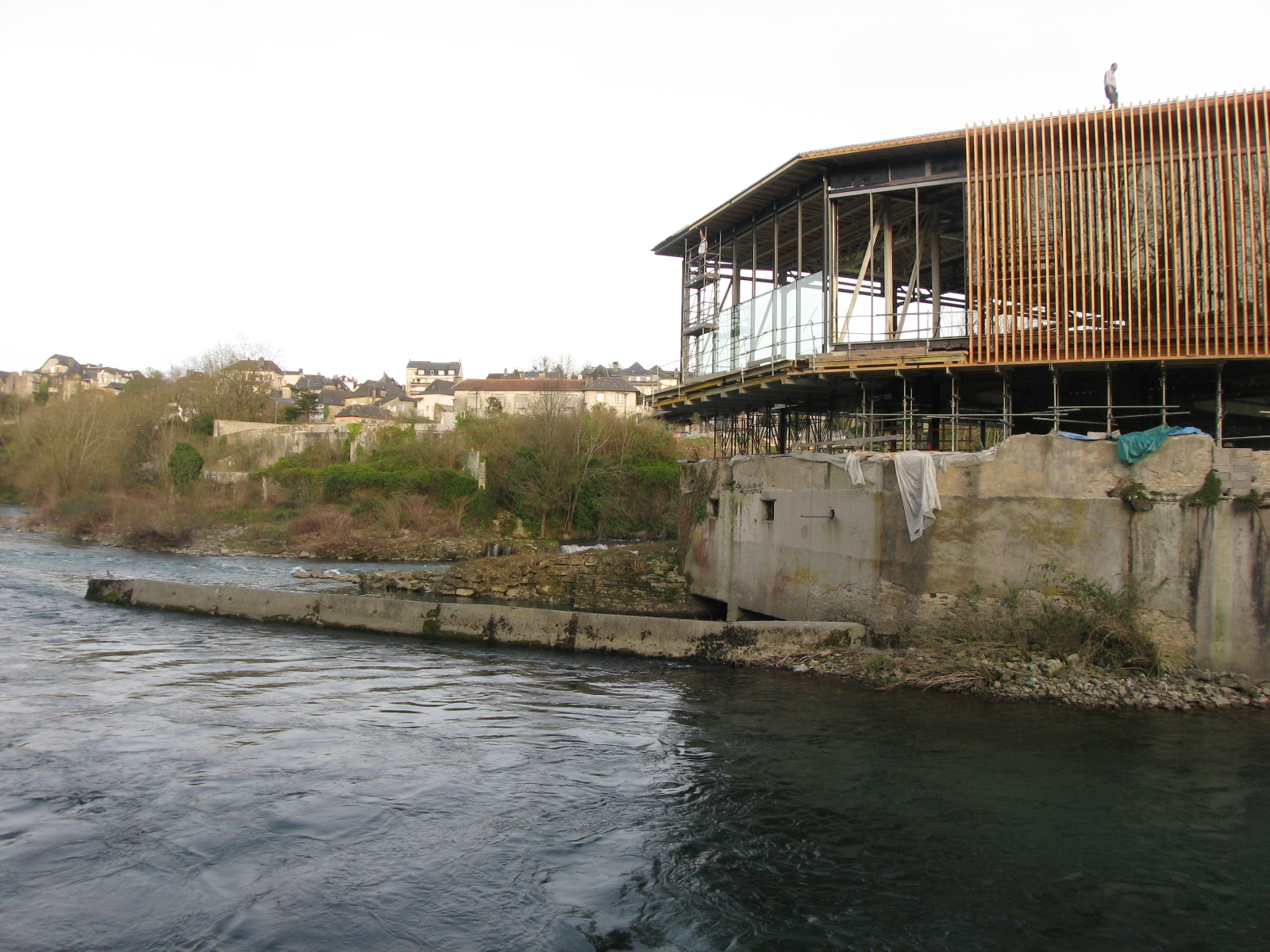 Médiathèque sur les berges du gave d'Oloron-Sainte-Marie (Pyrénées-Atlantiques) (Pyrénées).